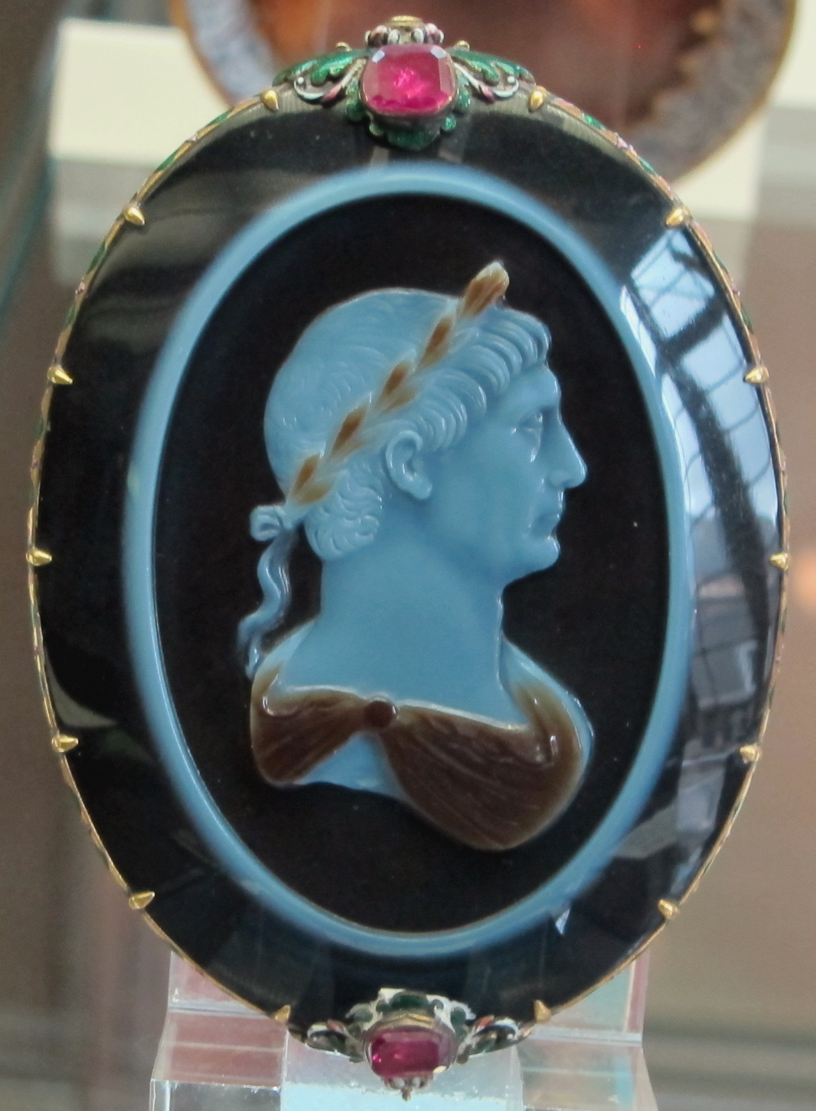 Arte romana, traiano, sardonice, 110 ca.